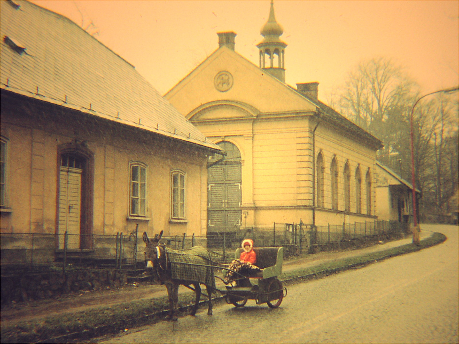 Kostel Jedoty Bratrské, cca 1965